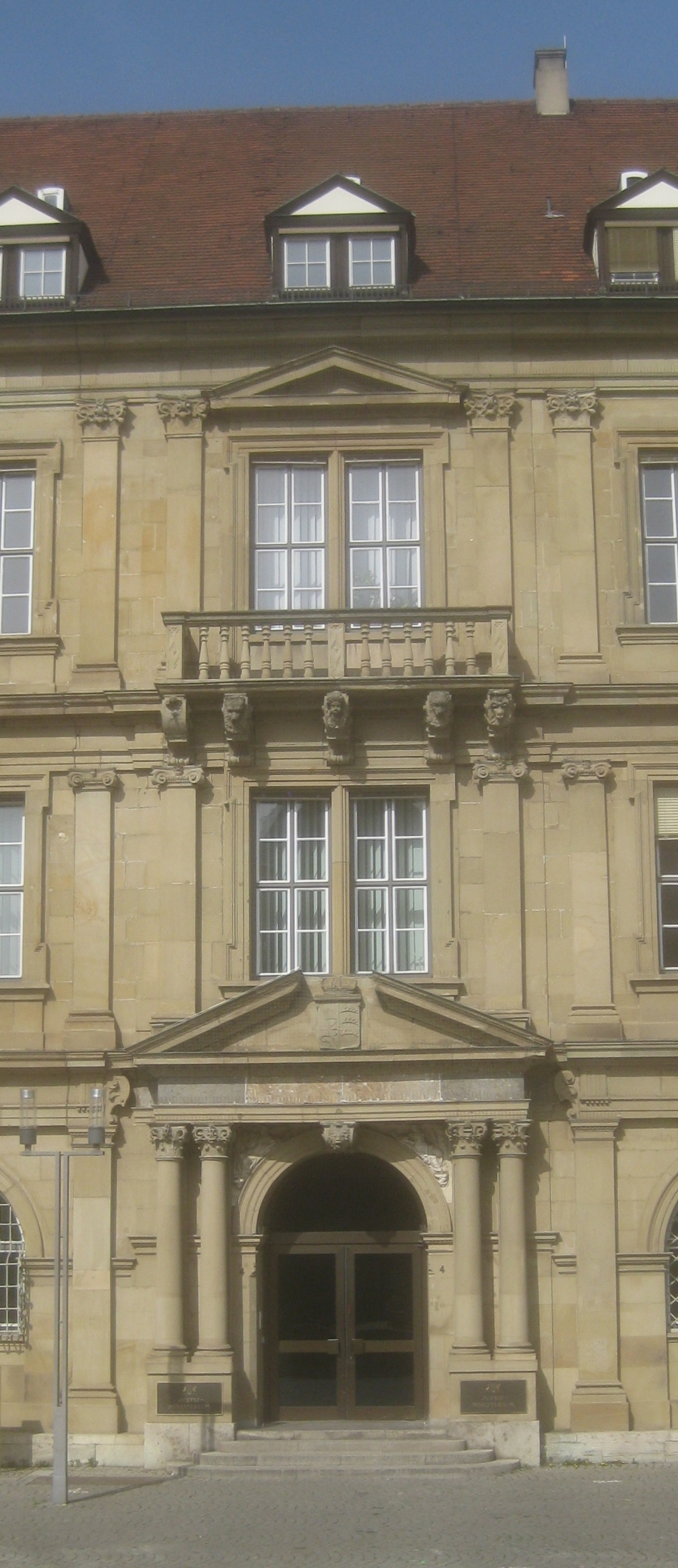 Mittelachse des Prinzenbaus in Stuttgart.